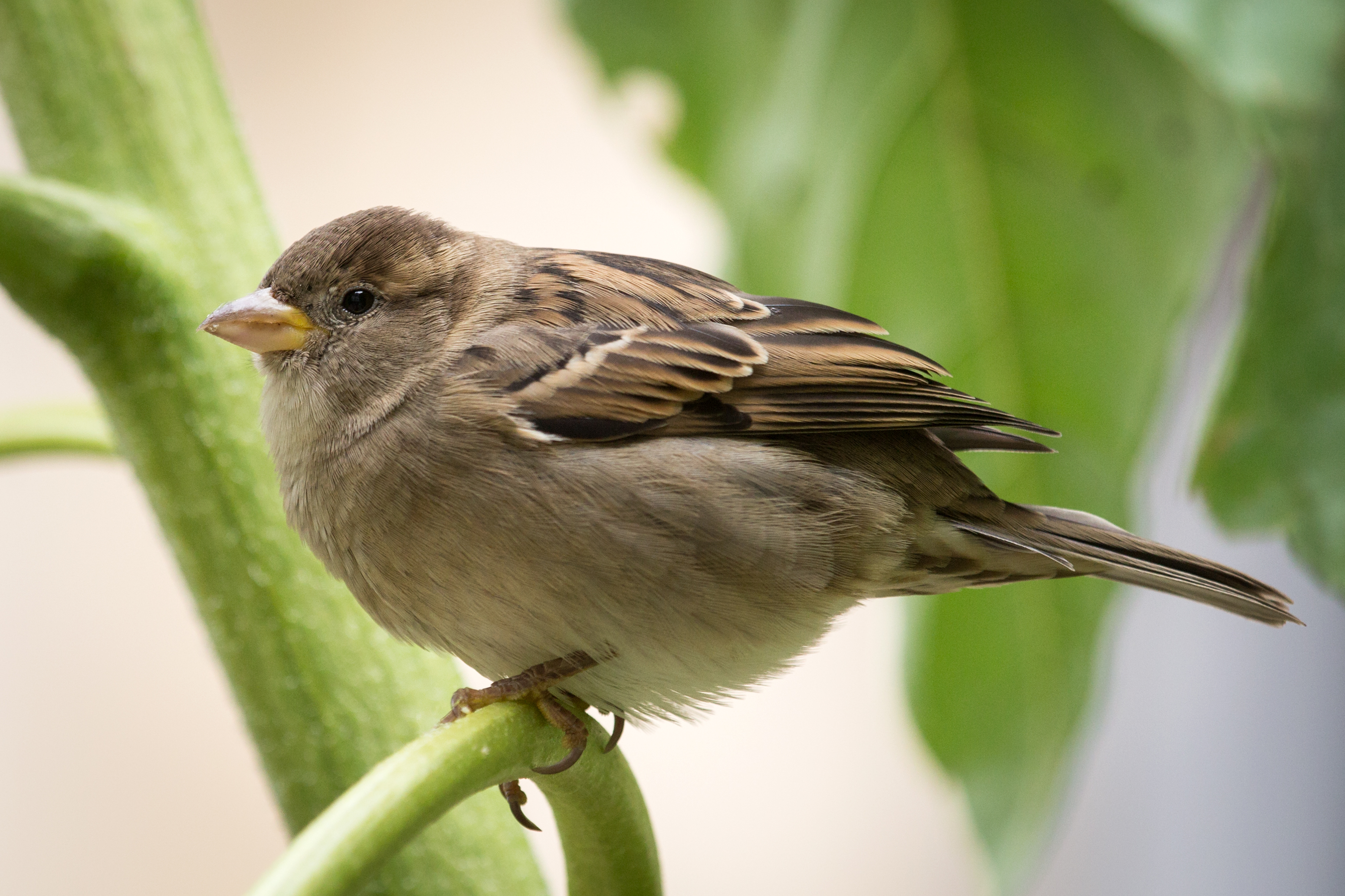 Домовый воробей (самка)